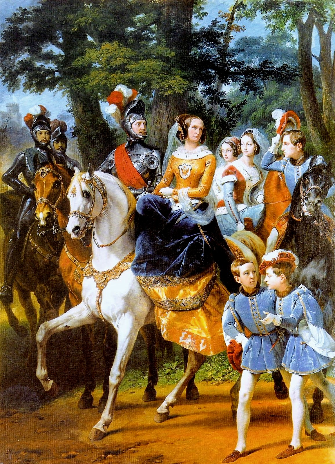 «Царскосельская карусель» Николай I и его семья изображены участниками царскосельской карусели. В центре картины в образе Прекрасной дамы - Александра Федоровна, одетая в средневековое платье из золотой парчи и синего бархата, на белоснежном коне, рядом - ее верный рыцарь Николай, в свите - дочери, а пажами - младшие сыновья. На Николае I, наследнике Александре Николаевиче и муже старшей дочери Максимилиане Лейхтенбергском - исторические доспехи XVI века из коллекции самого императора. Николай I был страстным коллекционером оружия, благодаря ему в Гатчинском дворце сформировалось столь обширное собрание. - сегодня экспонируется в Екатерининском дворце г.Пушкина, хотя в Гатчинский дворец «Царскосельская карусель» поступила в 1855 году. Статья на сайте Рыцарская карусель - царская забава